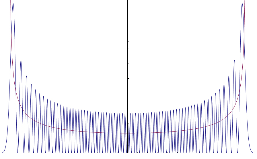 Wahrscheinlichkeit, ein Teilchen im quantenmechanischen Oszillatorpotential zu finden, bei n=70